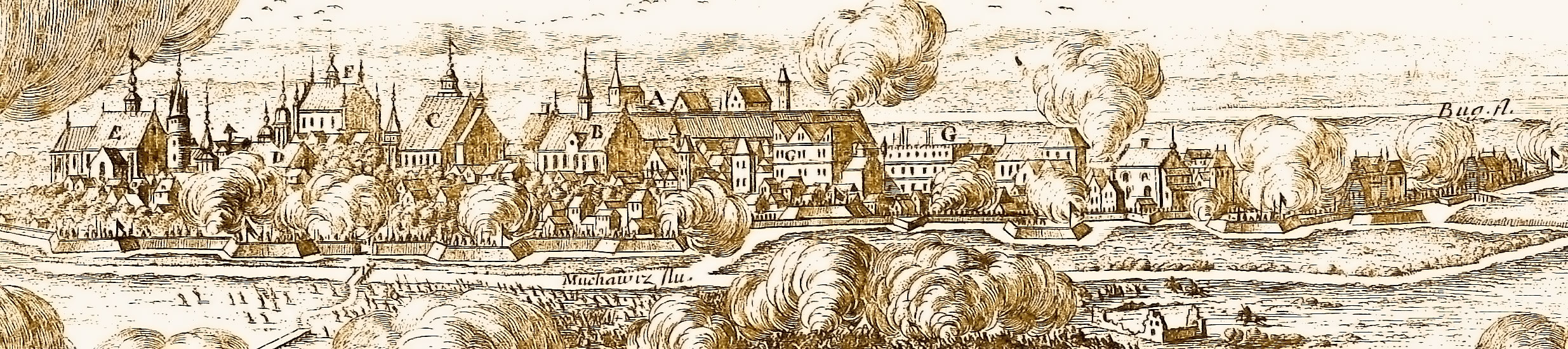 Беларуская (тарашкевіца): Берасьце ў XVII ст.